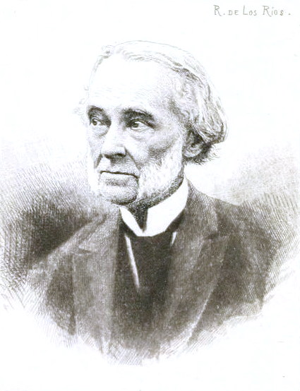 portrait d'Auguste Lacaussade